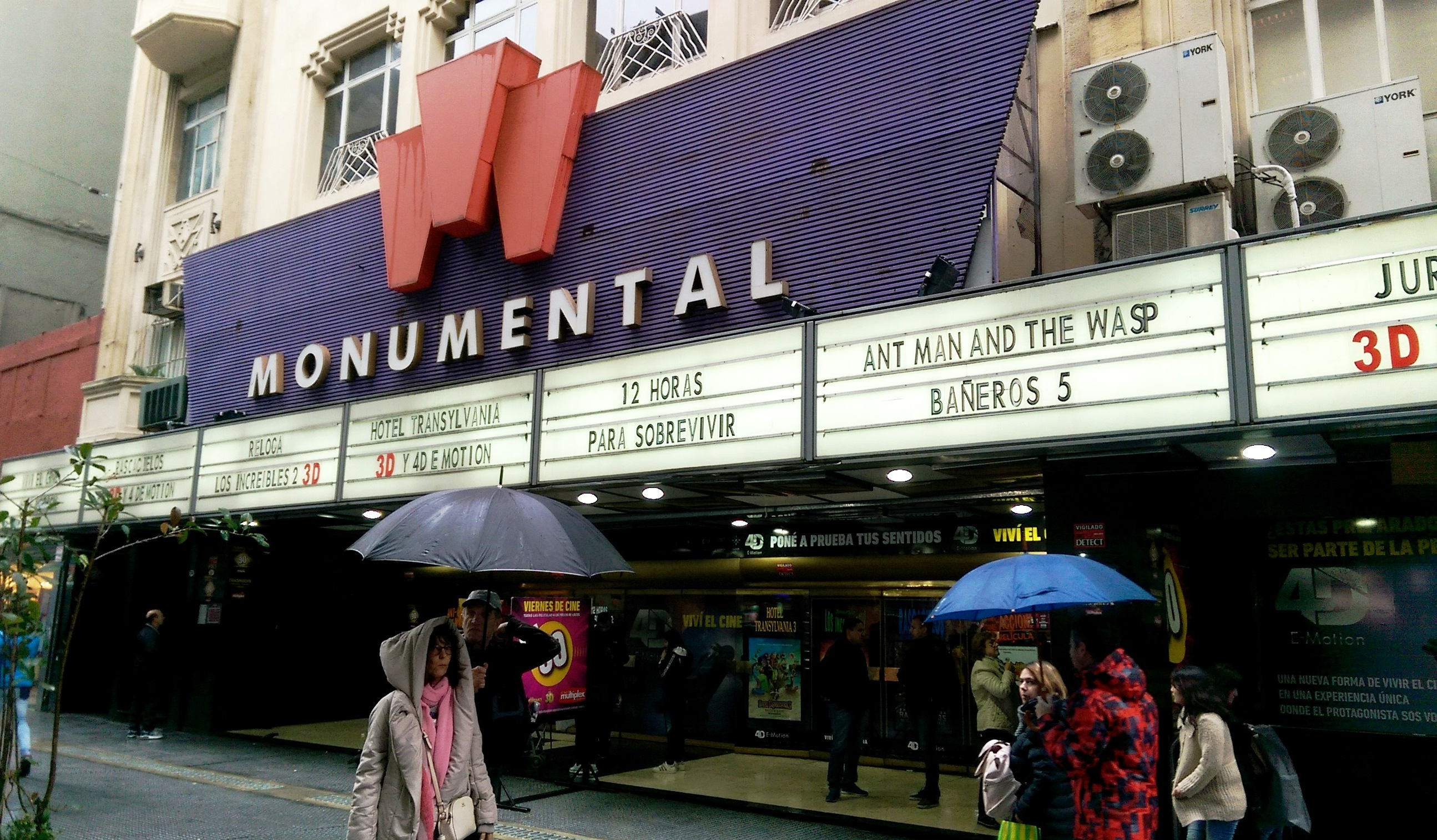 El Cine Monumental es un clásico cine de Buenos Aires, Argentina.